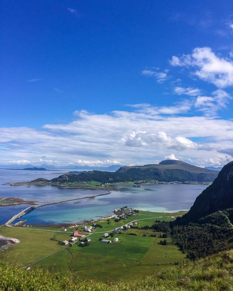 Ulla på Haramsøy med Flemsøya i bakgrunnen